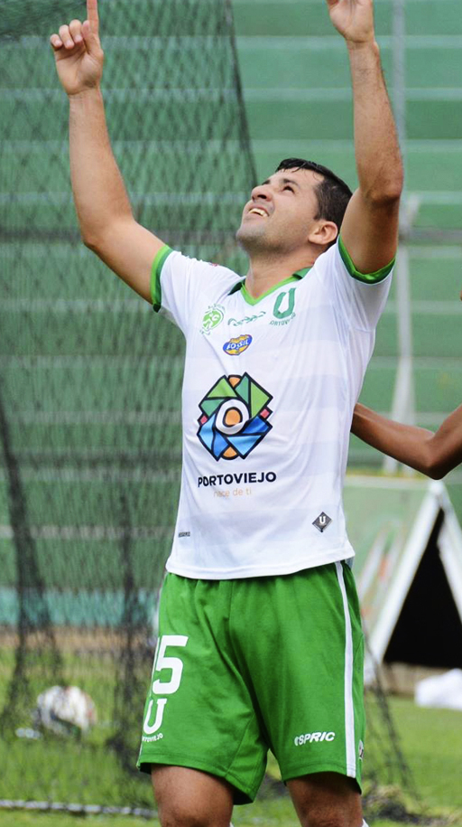 Hugo Vélez jugando en Liga de Portoviejo en 2015